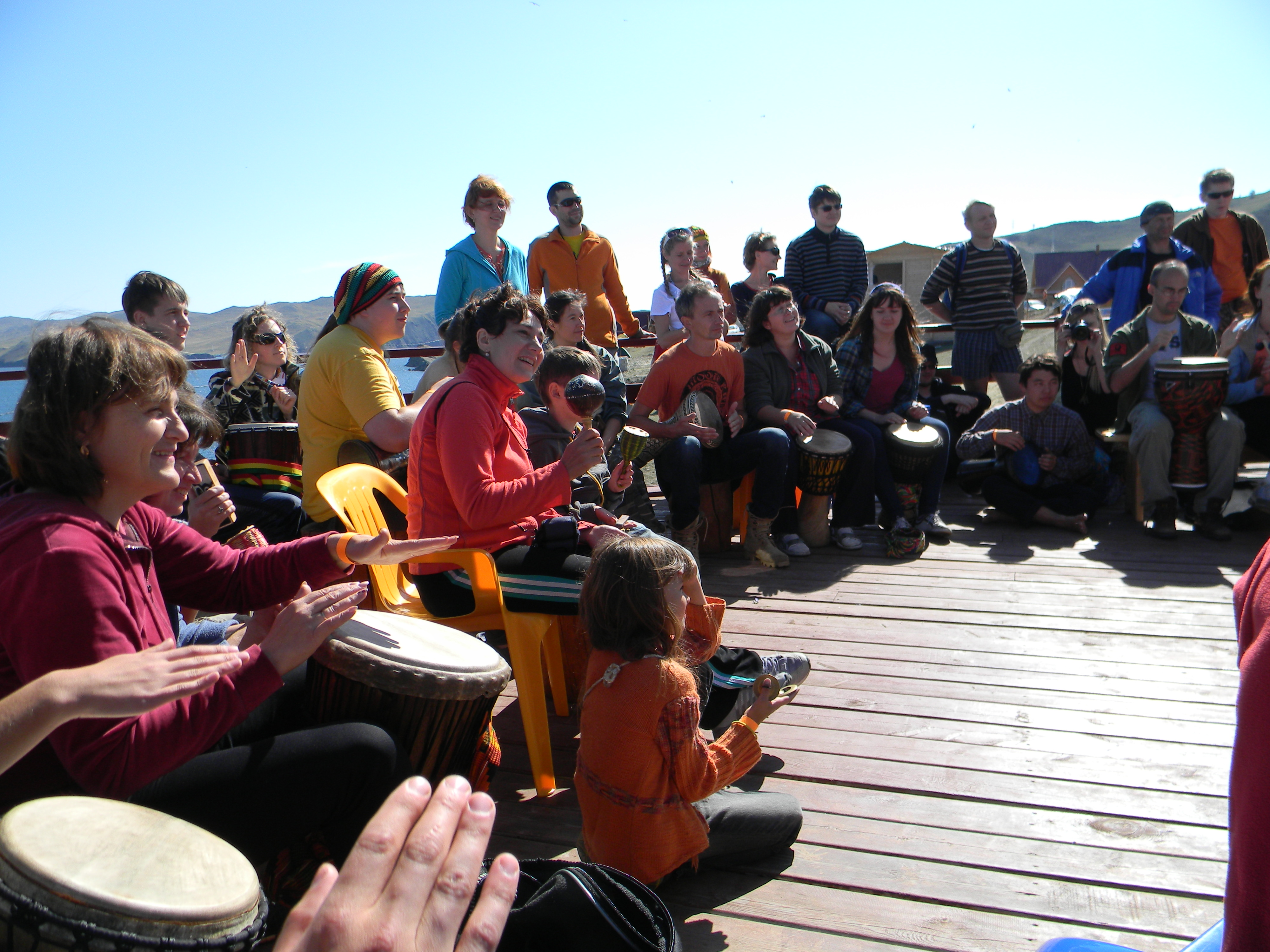 Мастер-класс на летнем фестивале Baikal-live